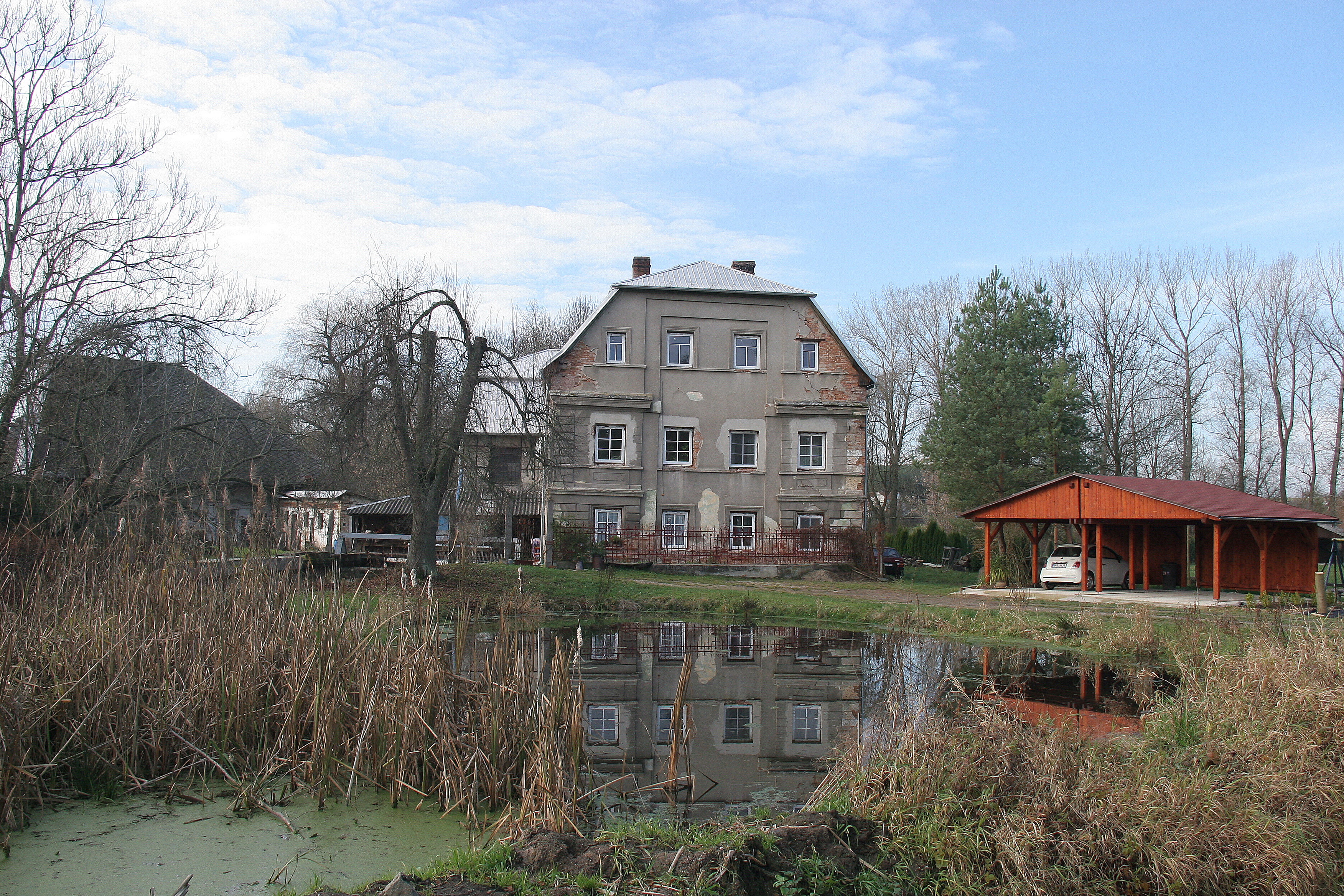 Mitrov čp. 60